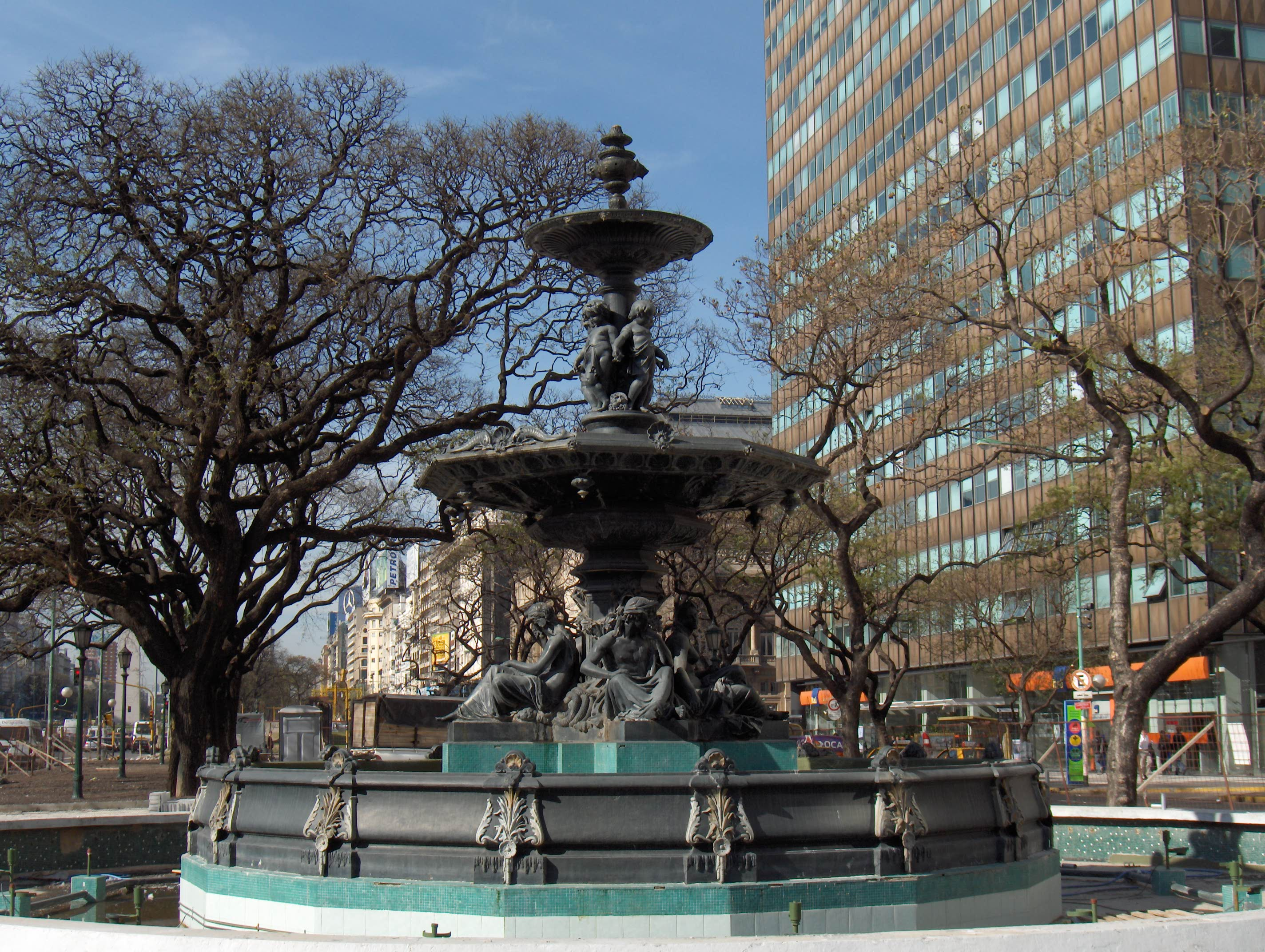 Fuente ubicada en la intersección de las avenidas 9 de Julio y Córdoba en la Ciudad Buenos Aires, Argentina. Antiguamente, junto con otra similar, se encontraba en la Plaza de Mayo de esa ciudad.